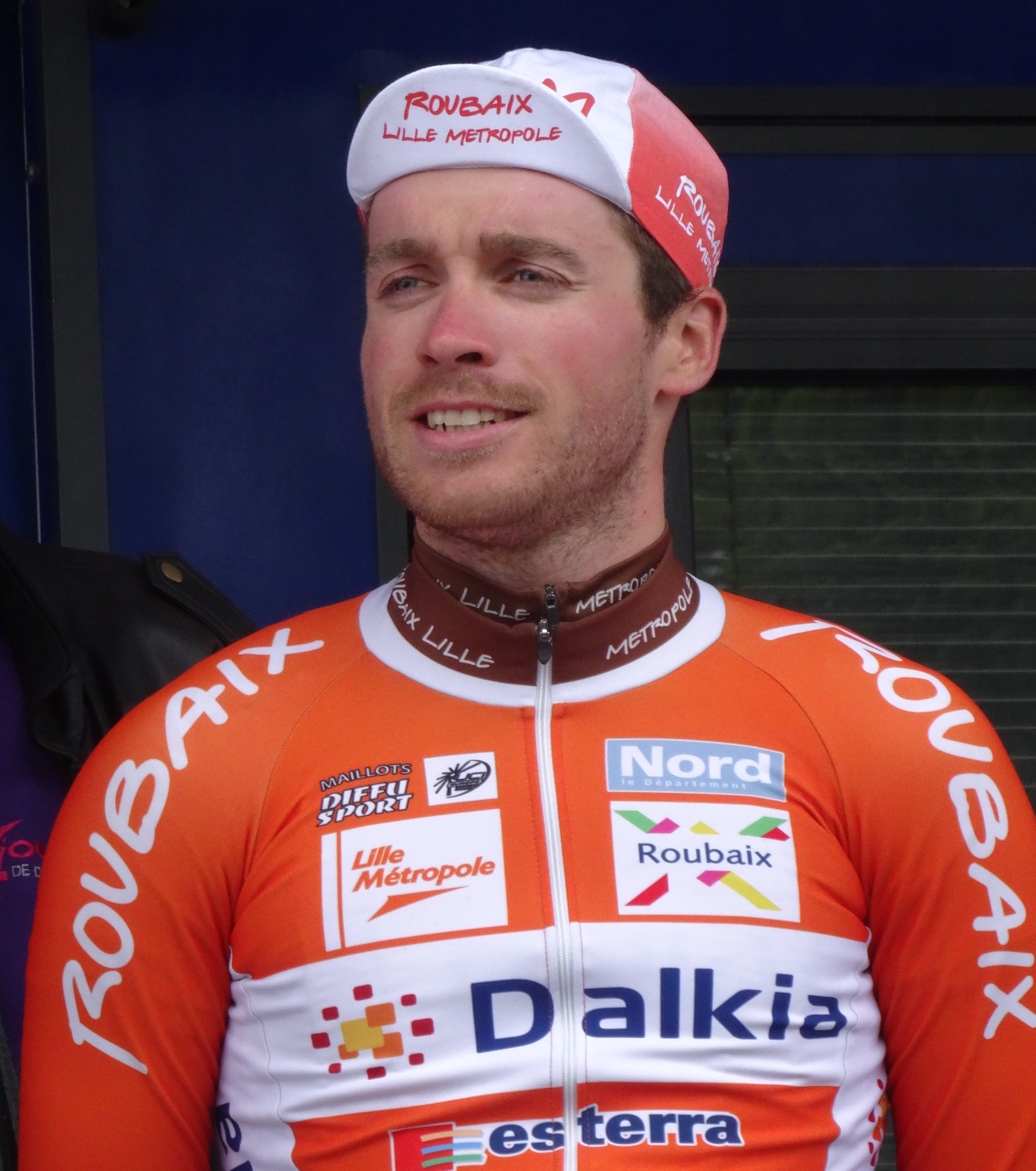 Reportage photographique réalisé le samedi 10 mai 2014 au départ de la quatrième étape de l'édition 2014 des Quatre jours de Dunkerque à Ardres, Pas-de-Calais, Nord-Pas-de-Calais, France. Depicted person: Romain Pillon Depicted team: Roubaix Lille Métropole